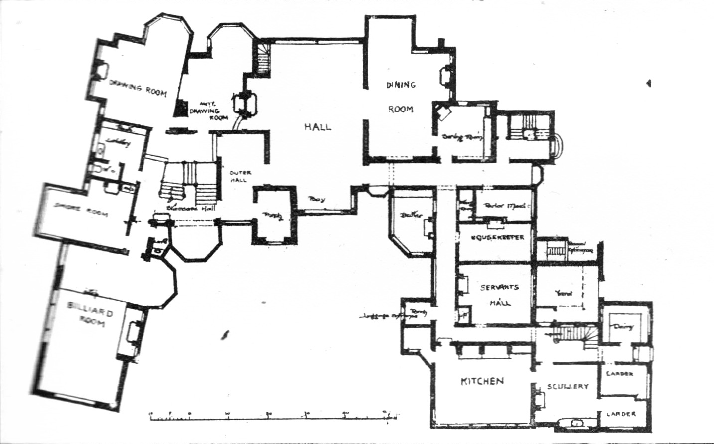 Fig. 18 Bidston Court Floorplan